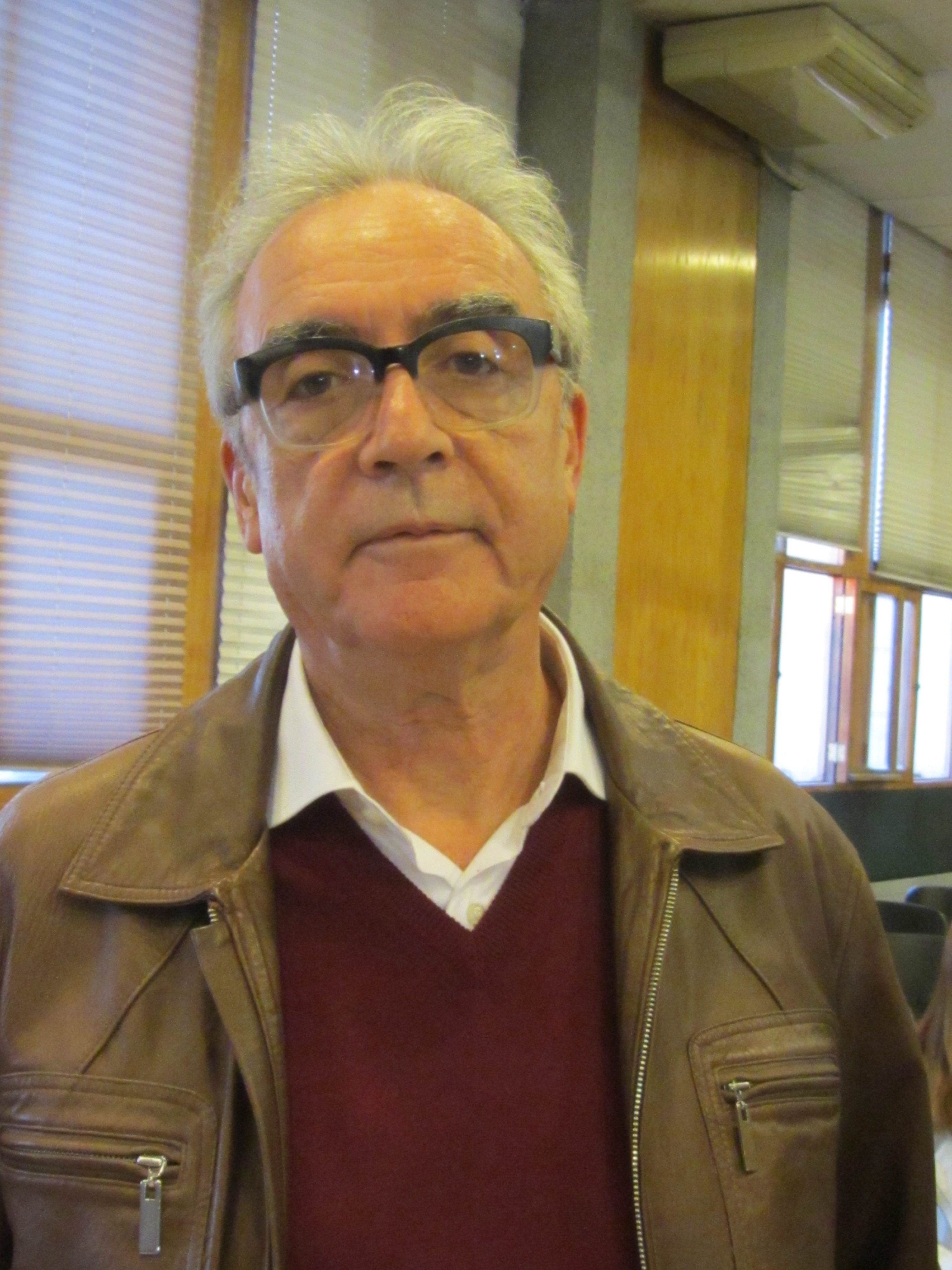 El escritor español Juan José Millás en la Feria Internacional del Libro de Santiago 2016. Diálogo con el periodista chileno Roberto Careaga sobre la obra de Millás Desde la sombra. Sala Pedro Prado del Centro Cultural Estación Mapocho, 02.11.2016